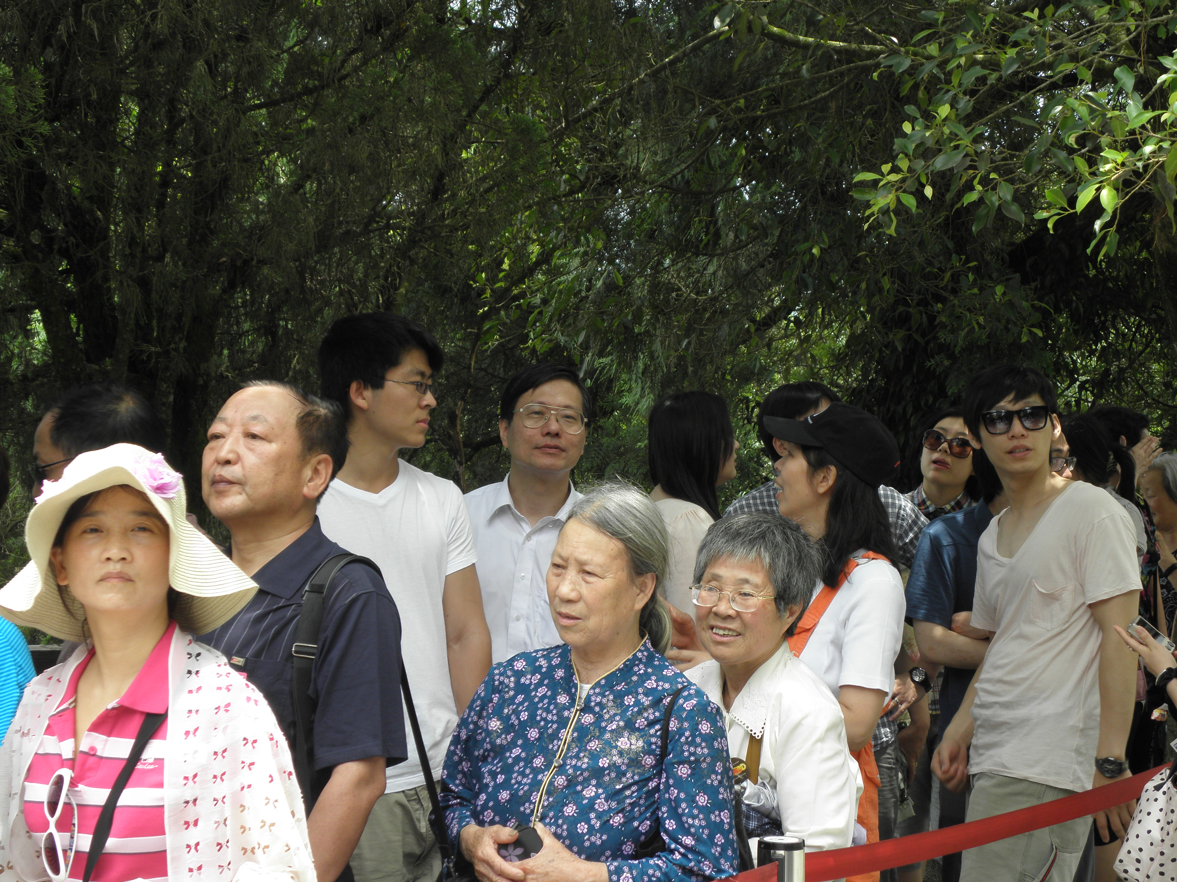 中文（台灣）: 中國大陸遊客在日月潭排隊拍照。